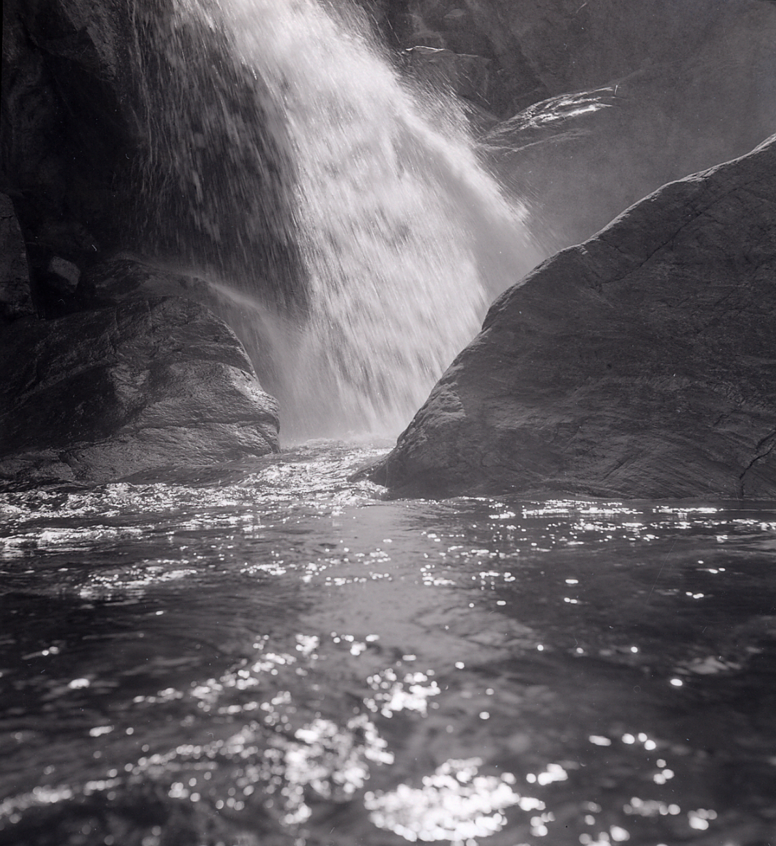 Serie fotografica : Anzola d'Ossola, 1960 / Paolo Monti. - Buste: 10, Fototipi: 11 : Negativo b/n, gelatina bromuro d'argento/ pellicola ; 6x9. - ((Serie costituita da 11 negativi identificati con i nn.: 17069-17079. Sulla busta del negativo R17075 manoscritto: "AZ/ (Diaframma)". La suddetta serie è contenuta nella scatola identificata con la numerazione R17049/R17277. Sul coperchio iscrizione manoscritta a pennarello: "Anzola"